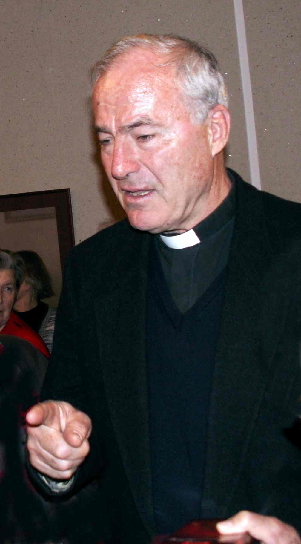 Hermanas Šulcas, kunigas misionierius Ruandoje